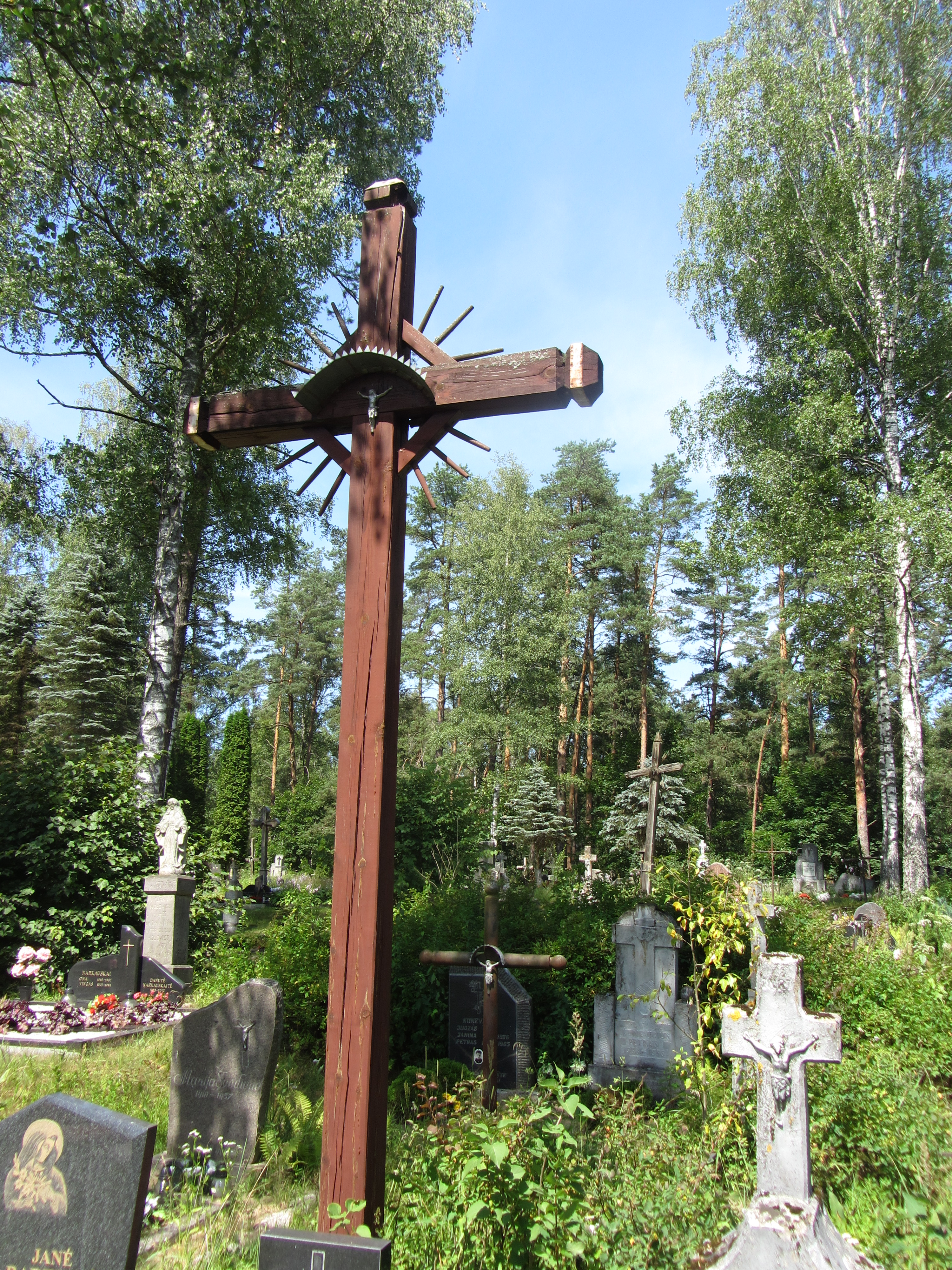 Rudnia, Lithuania